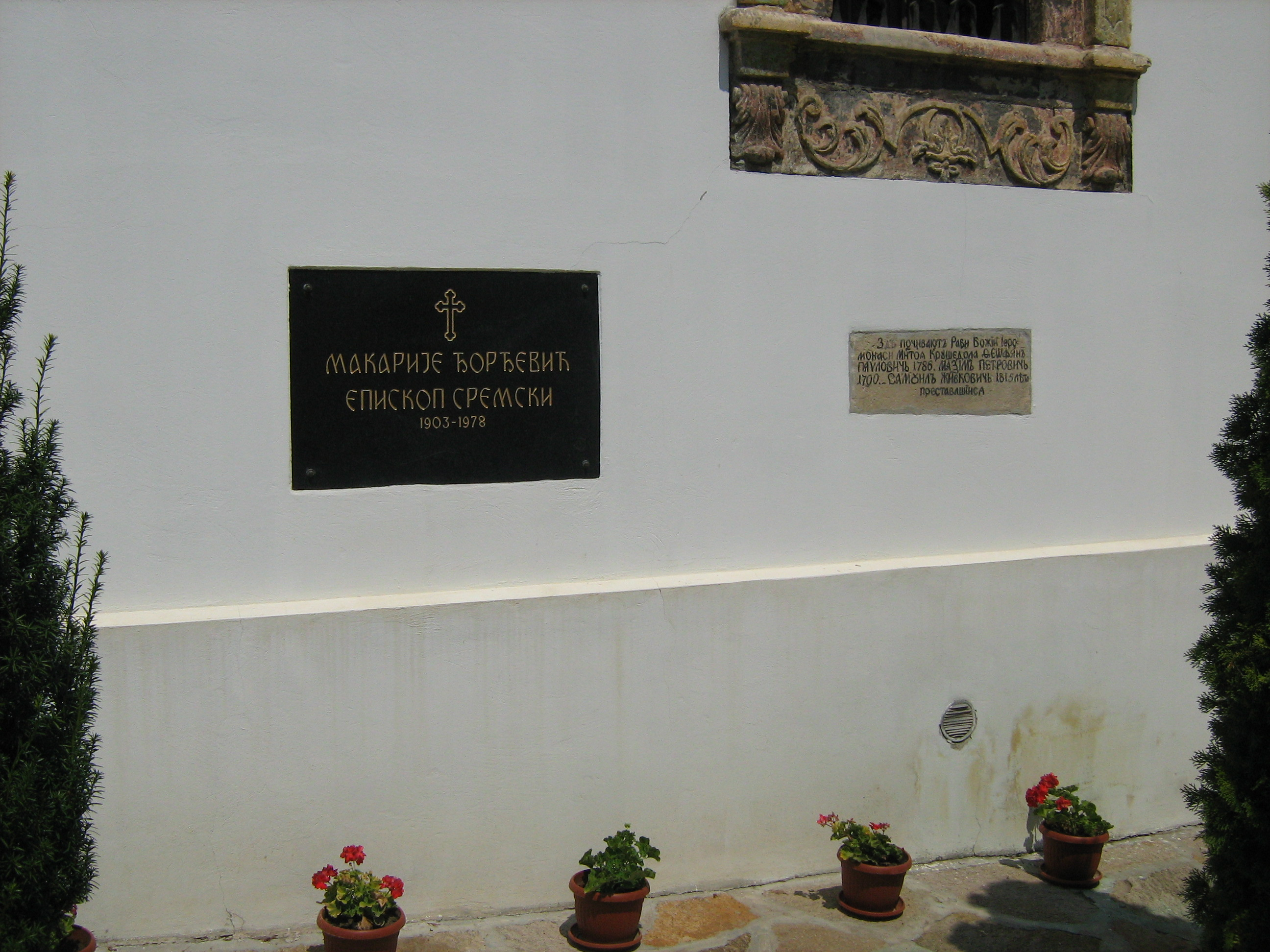 Спомен плоче на цркви